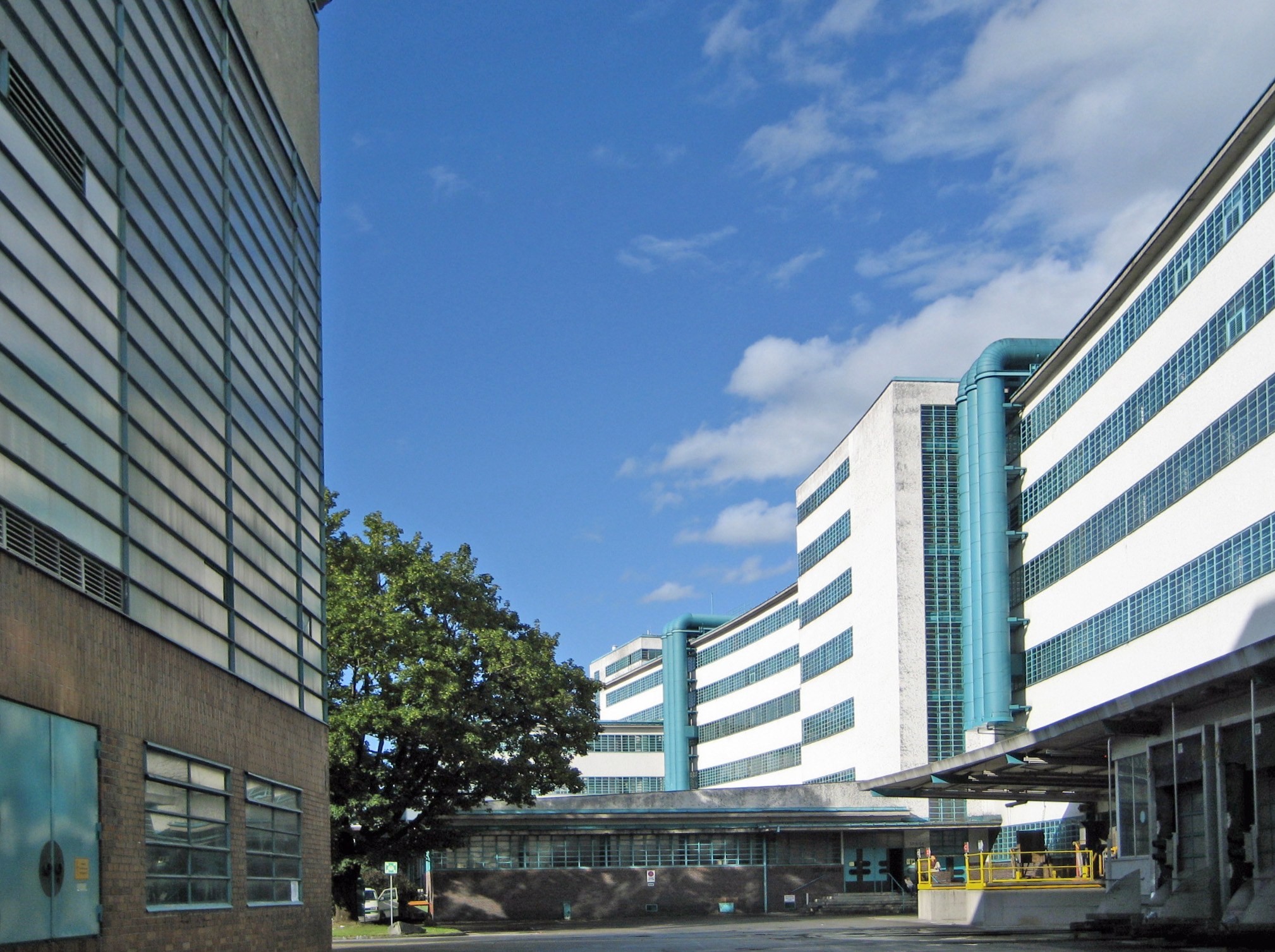 Zigarettenfabrikation (rechts) und Kraftwerk (links) der Tabakfabrik Linz